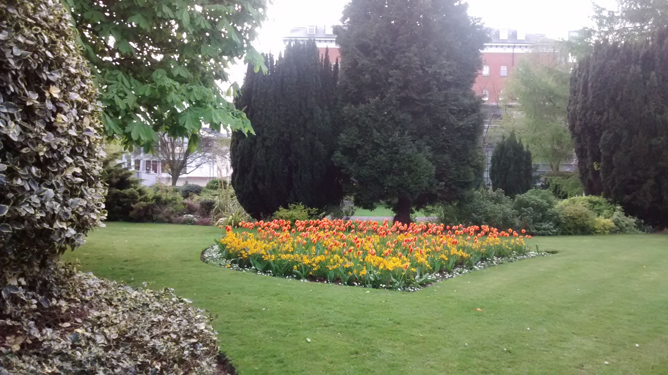 Ogród zamkowy